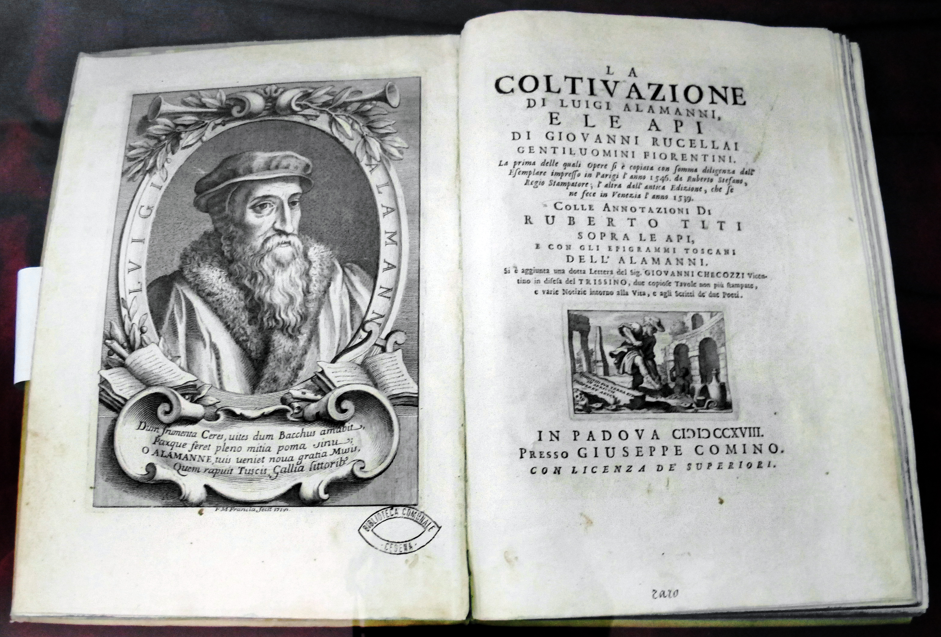 Biblioteca Malatestiana - MIBAC This is a photo of a monument which is part of cultural heritage of Italy.